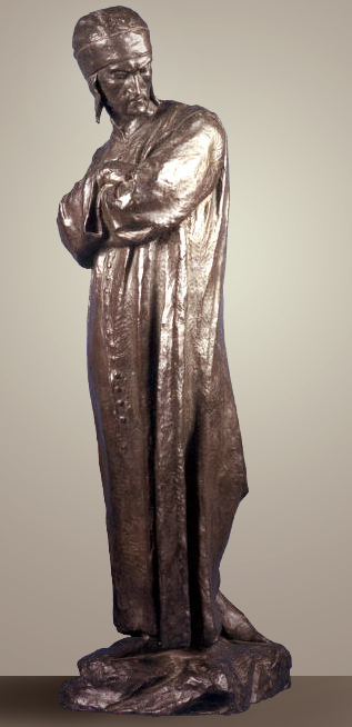 Almeida Reis: Dante ao voltar do exílio, 1889. Bronze. Museu Nacional de Belas Artes, Brasil